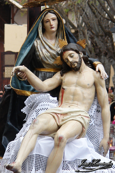 Santísimo Cristo del Calvario, 1814. Fernando Estévez de Salas Parroquia de San Isidro Labrador y Santuario del Calvario, Villa de La Orotava (Tenerife, Canarias)